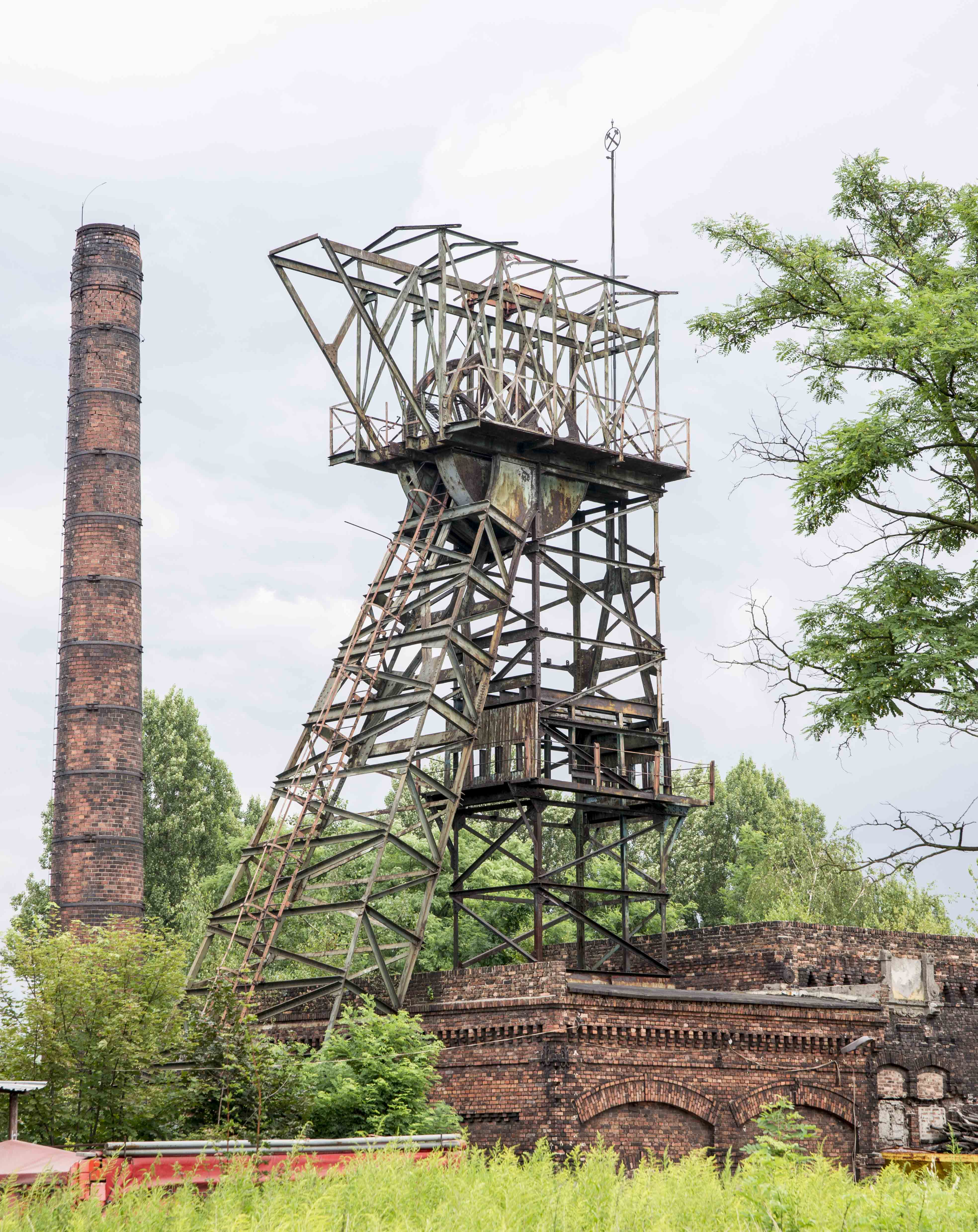 Brandenburggrube, Ruda Śląska, Polen, Fördergerüst über Schacht Franciszek.